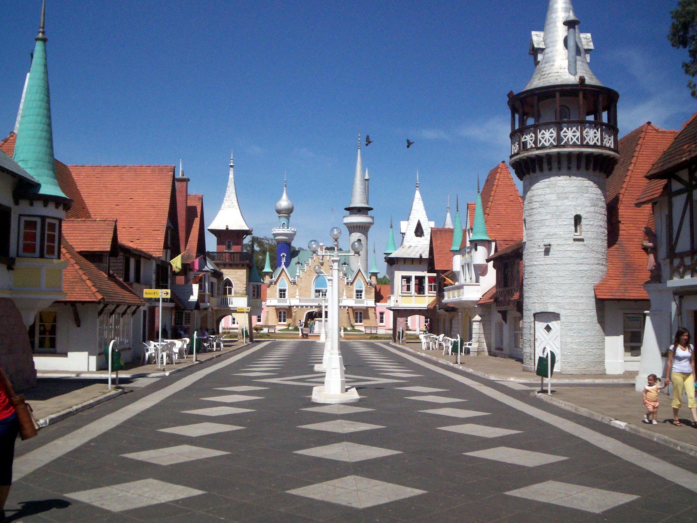 República de los Niños, localidad de Manuel B. Gonnet, La Plata (Argentina).